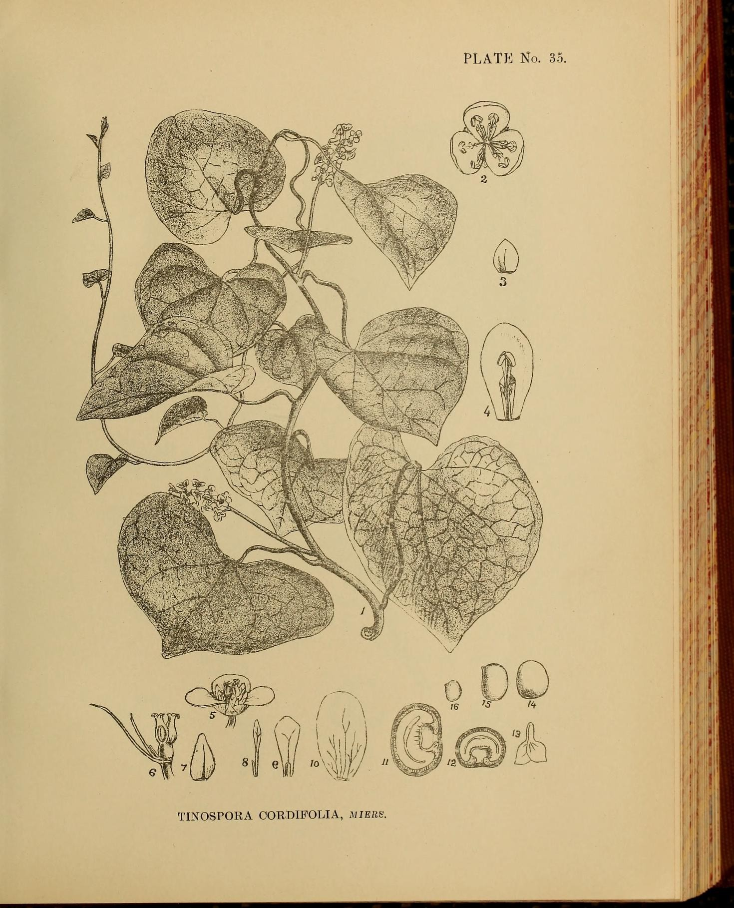 PLATE No. 35. iTij 1 , TINOSPORA OORDIPOLIA, MIEliS.